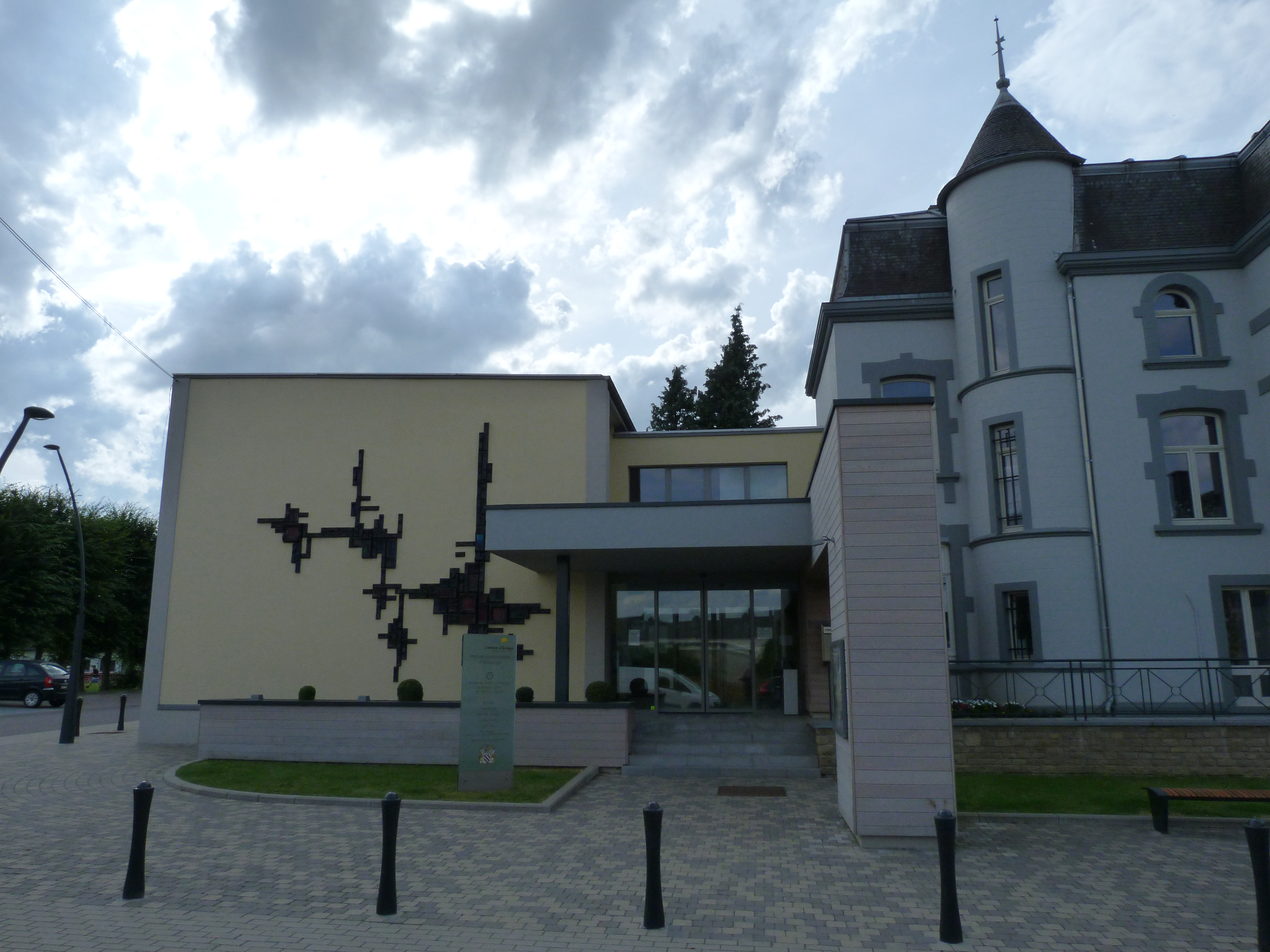 L'hotel de ville de la commune d'Aubange à Athus (entrée principale rénovée) (2012)